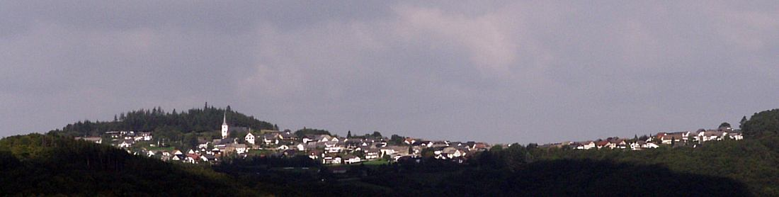 Reifferscheid/Eifel, Germany